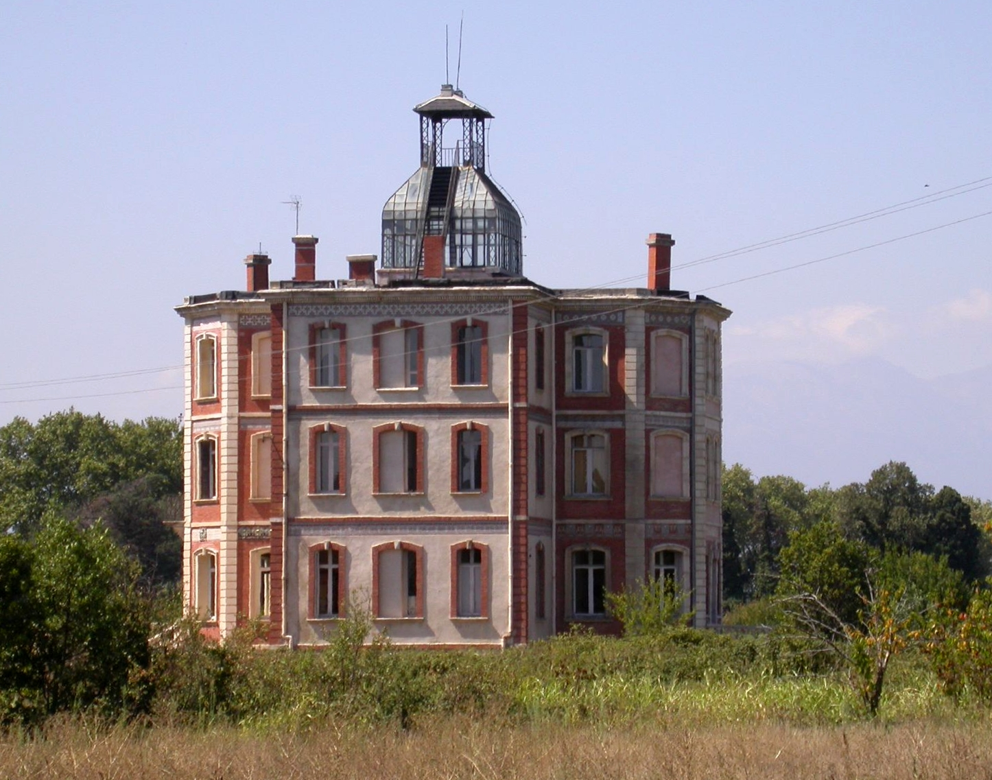 Edifici que serví de maternitat per les exiliades espanyoles després de la Guerra Civil. Elna. Rosselló. Foto retocada a partir de File:Maternitat d'Elna.jpg. S'ha ajustat lleugerament els nivells de color, s'ha redreçat la imatge segons verticalitat edifici i s'ha re-enquadrat lleugerament.